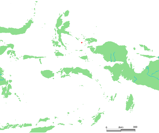 island of Gag, Indonesia